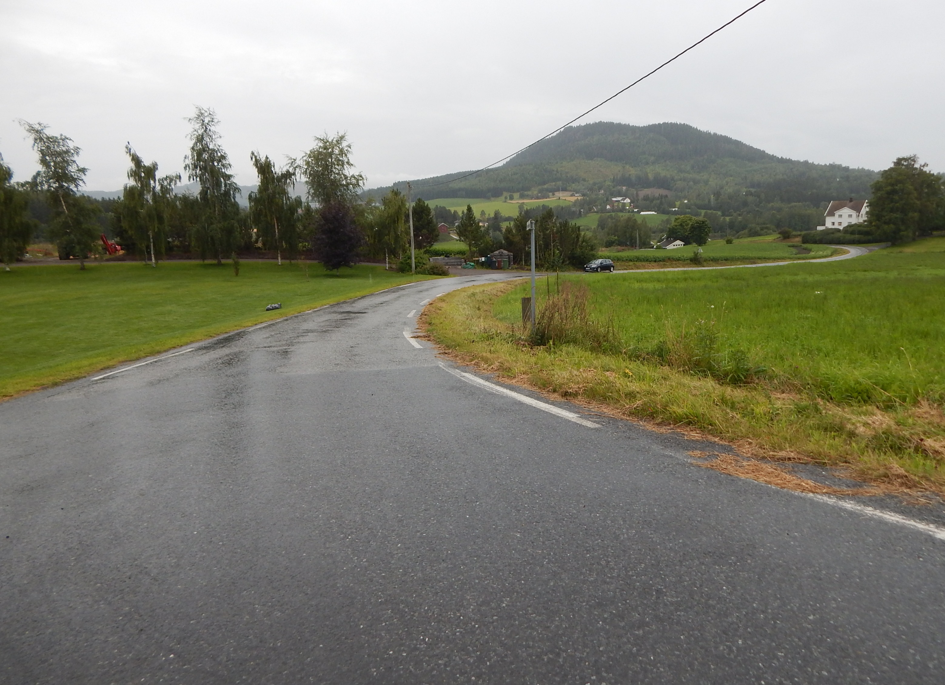 Helmeidvegen (fylkesvei 2308, tidl. FV37) nær enden mot Jorstadlinna